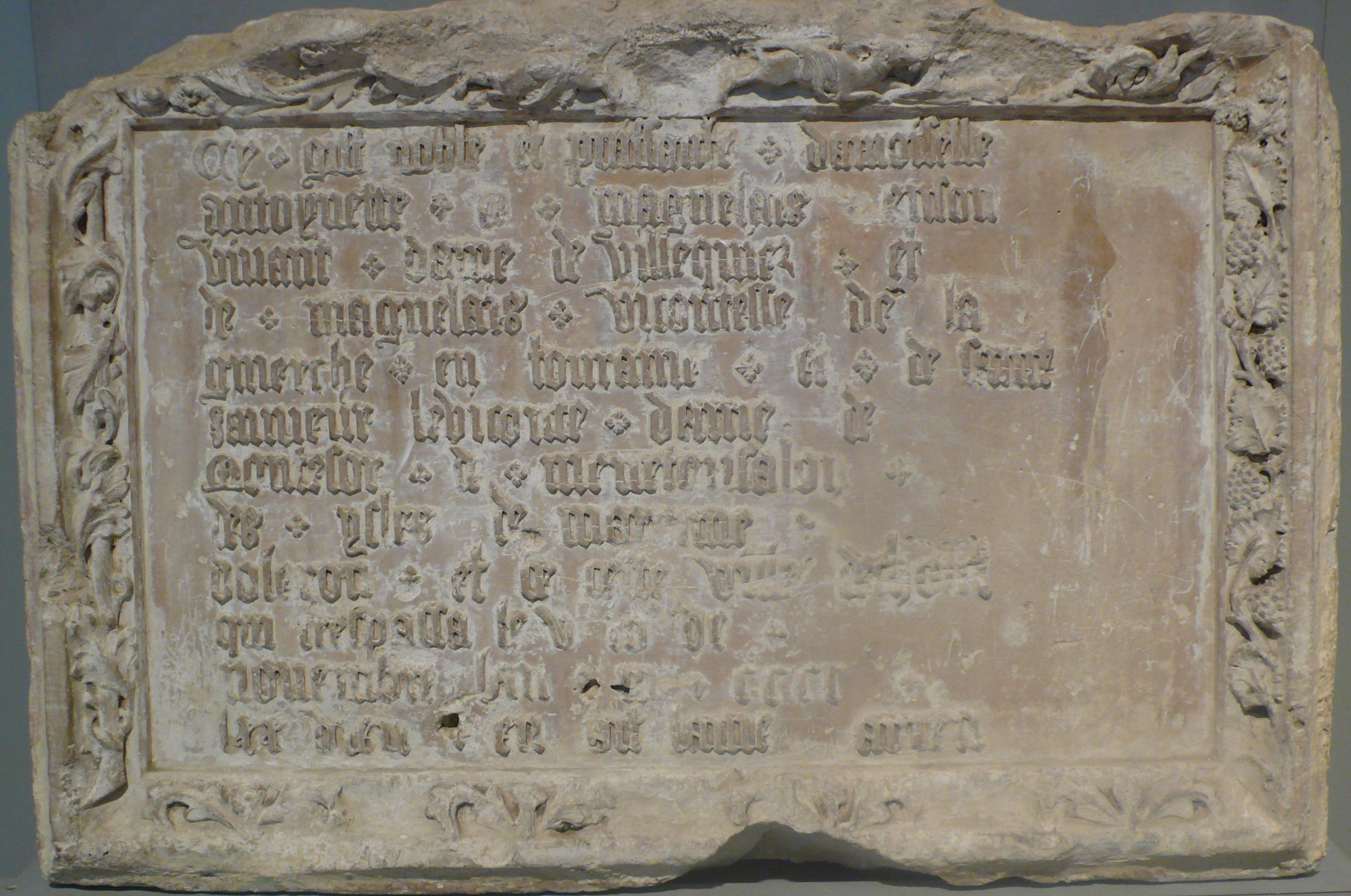 Pierre tombale Antoinette de Maignelais Calcaire, fin XVIeme siècle conservée au Musée d'art et d'histoire de Cholet. Provenance : ancienne chapelle de l'hôpital de Cholet, auparavant chapelle du couvent des Cordeliers